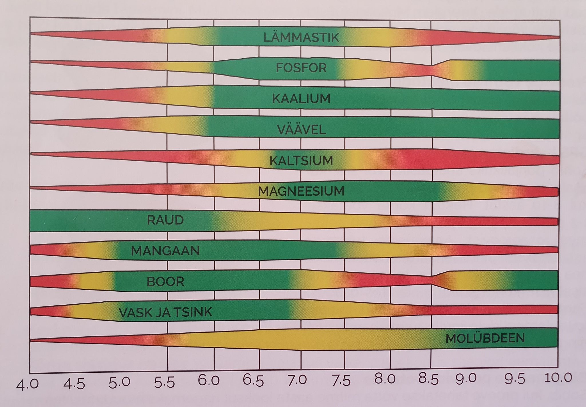 Pildil on näha, kuidas mingi toitaine omastatavus sõltub mulla pH-tasest.